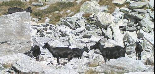 Capra di razza Nera di Verzasca Foto fatta da utente Elvezio